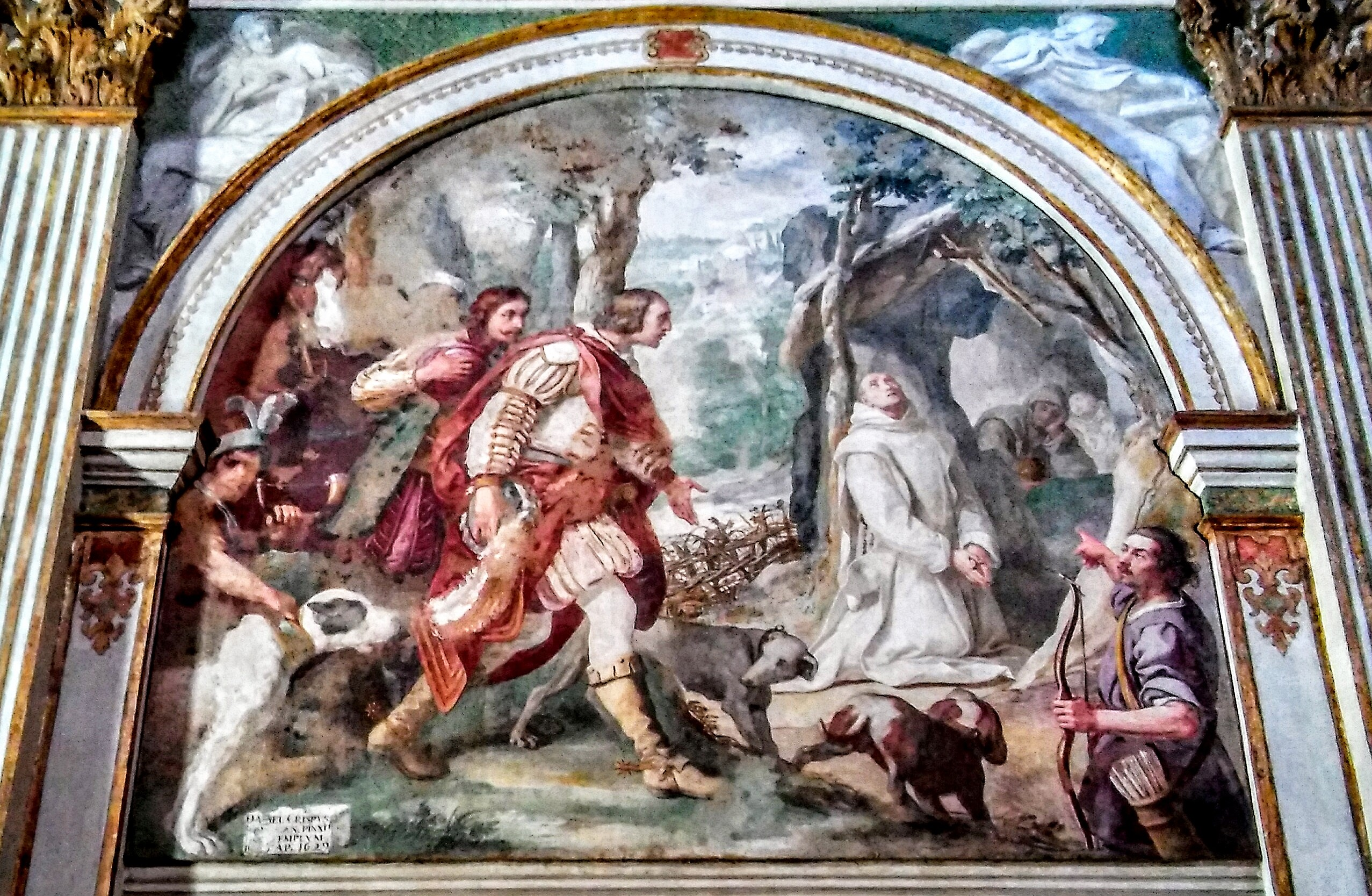 Affreschi nella Certosa di Garegnano: Incontro tra Ruggero di Calabria e san Bruno di Daniele Crespi